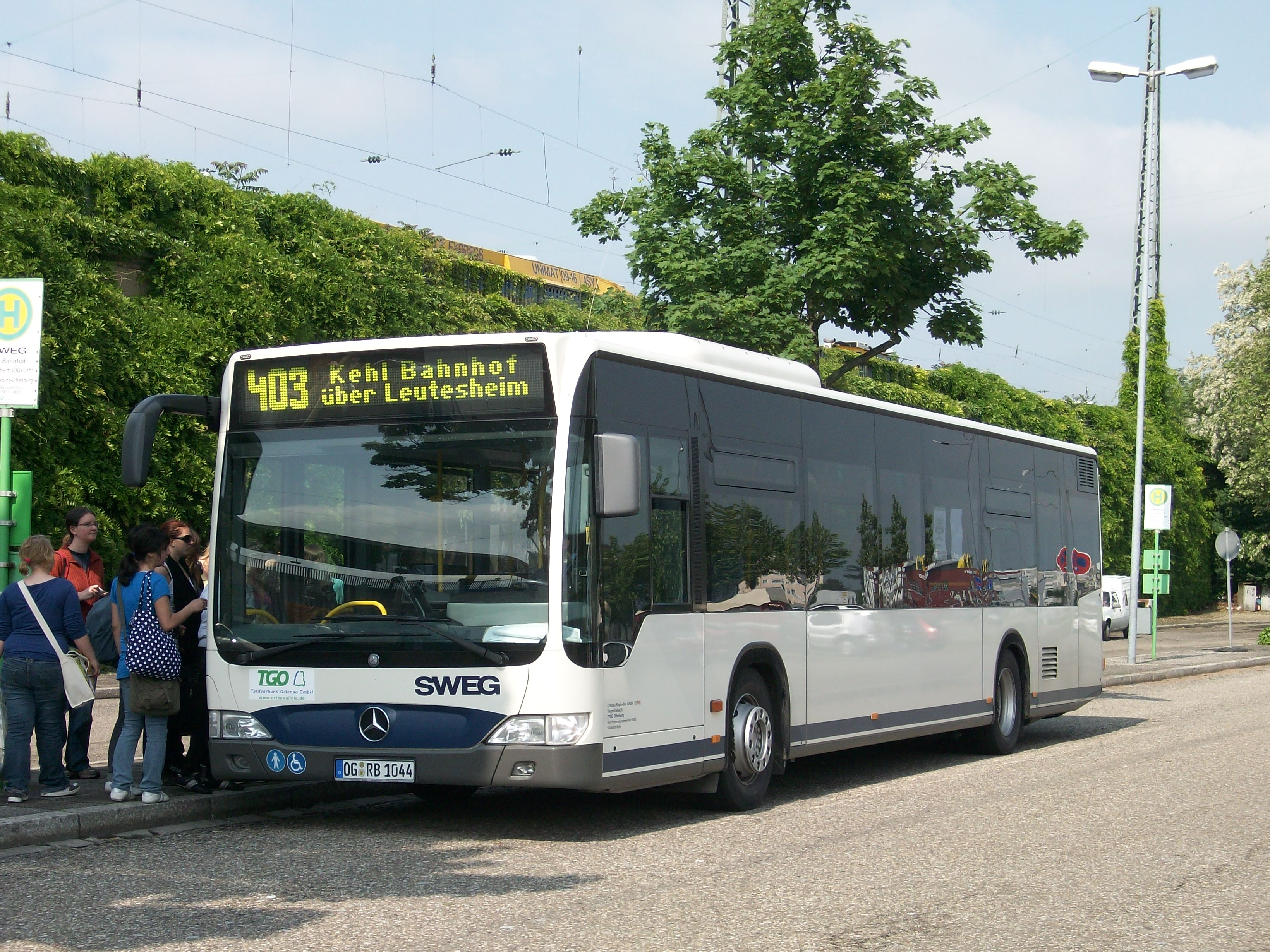 Mercedes-Benz Citaro, SWEG, devant la gare de Kehl (Allemagne)